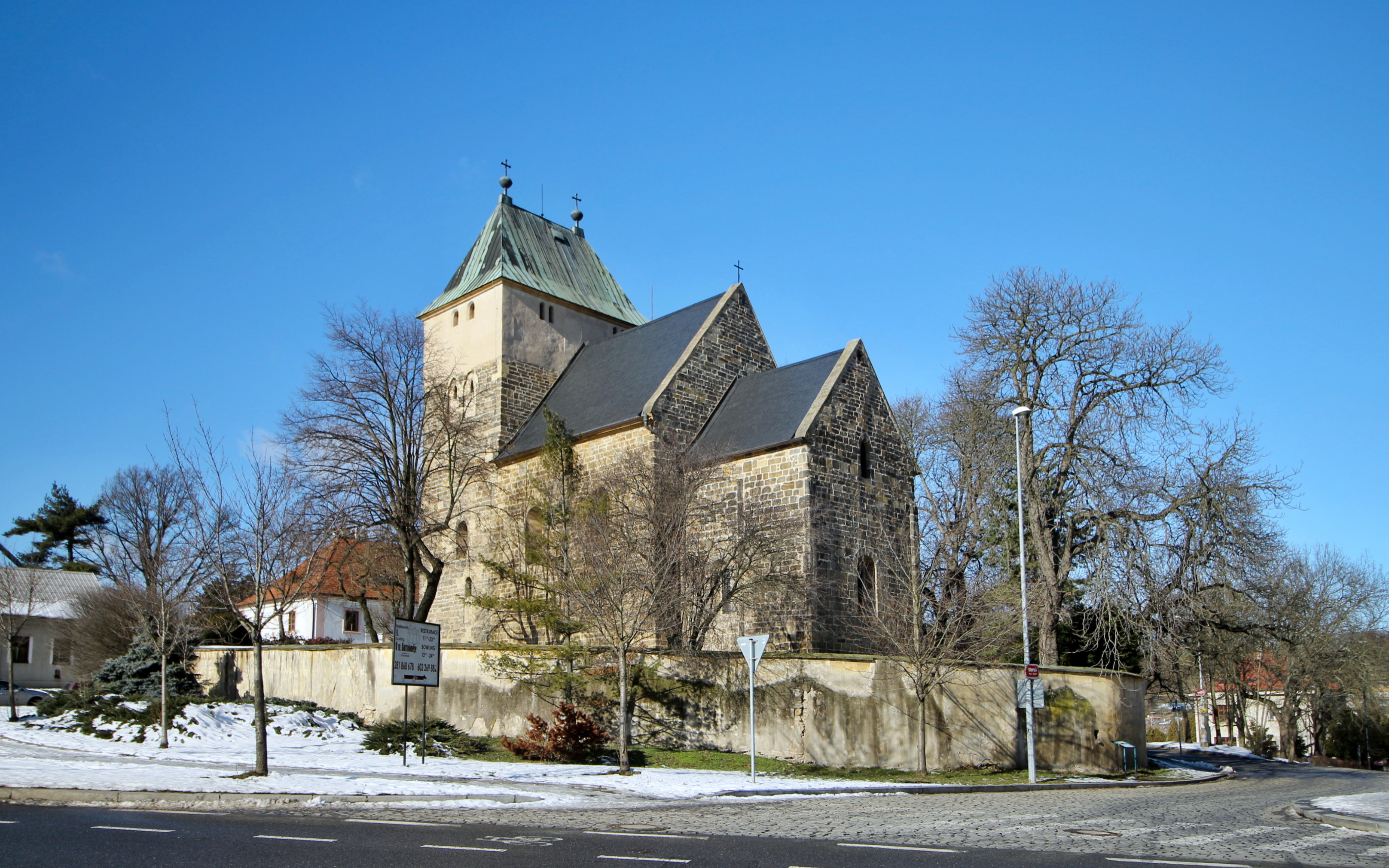 Praha-Kyje kostel sv. Bartoloměje